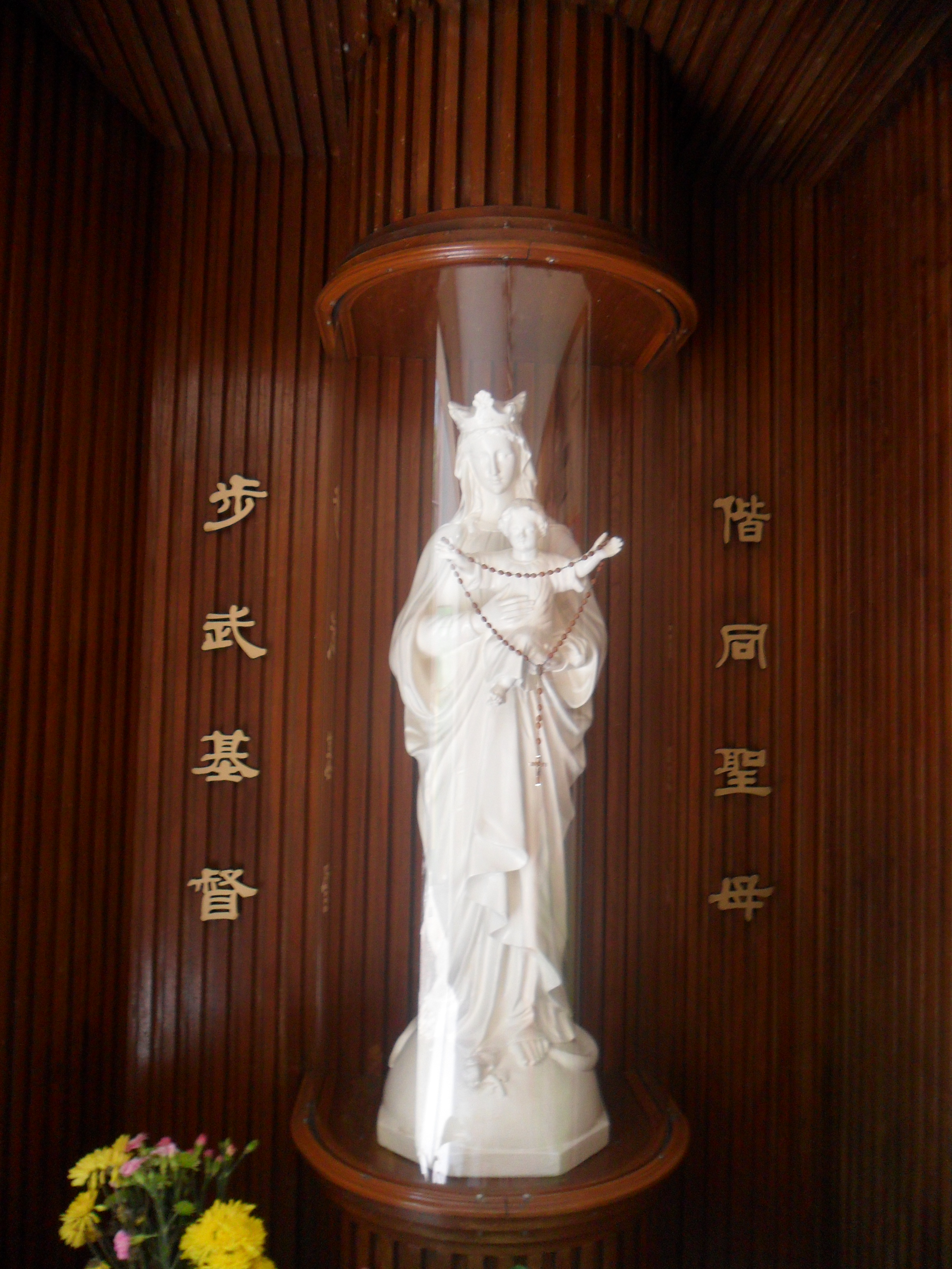 中文（香港）: 聖母玫瑰堂, 香港, 中國